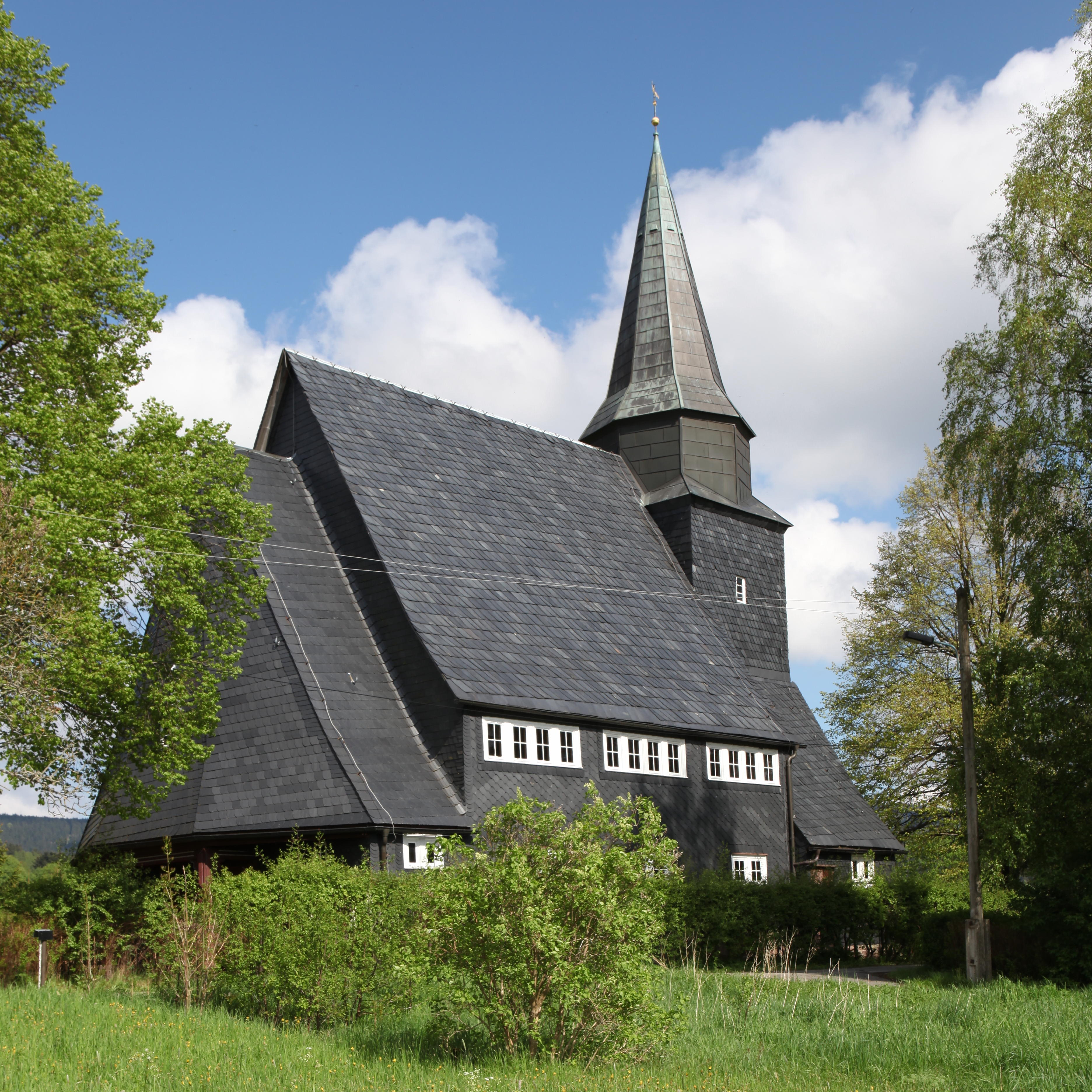 Evangelische Kirche Heidersbach, 1909 geweiht